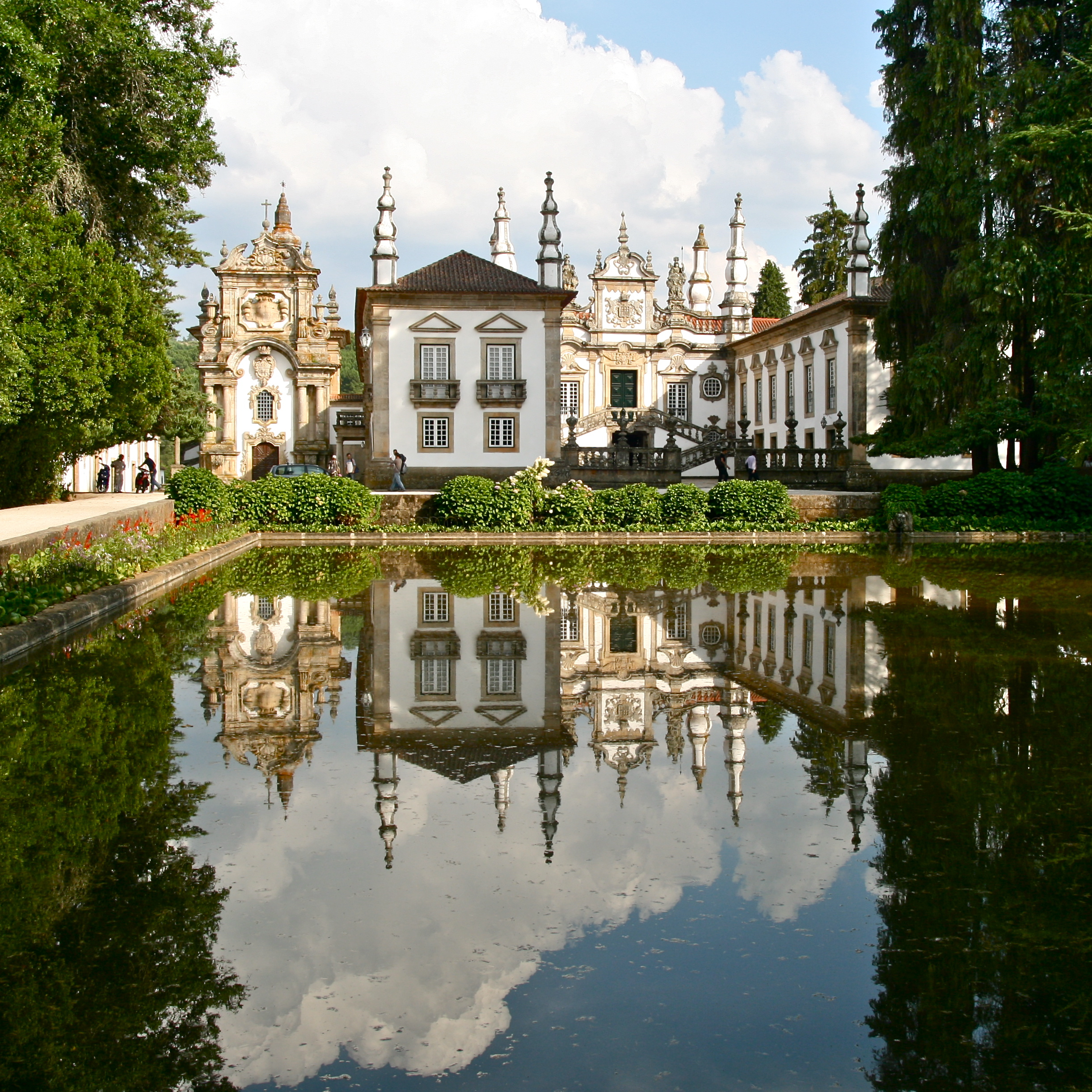 Casa de Mateus, Vila Real